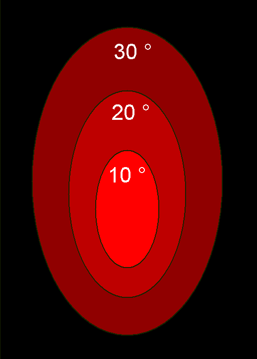 Openingshoek